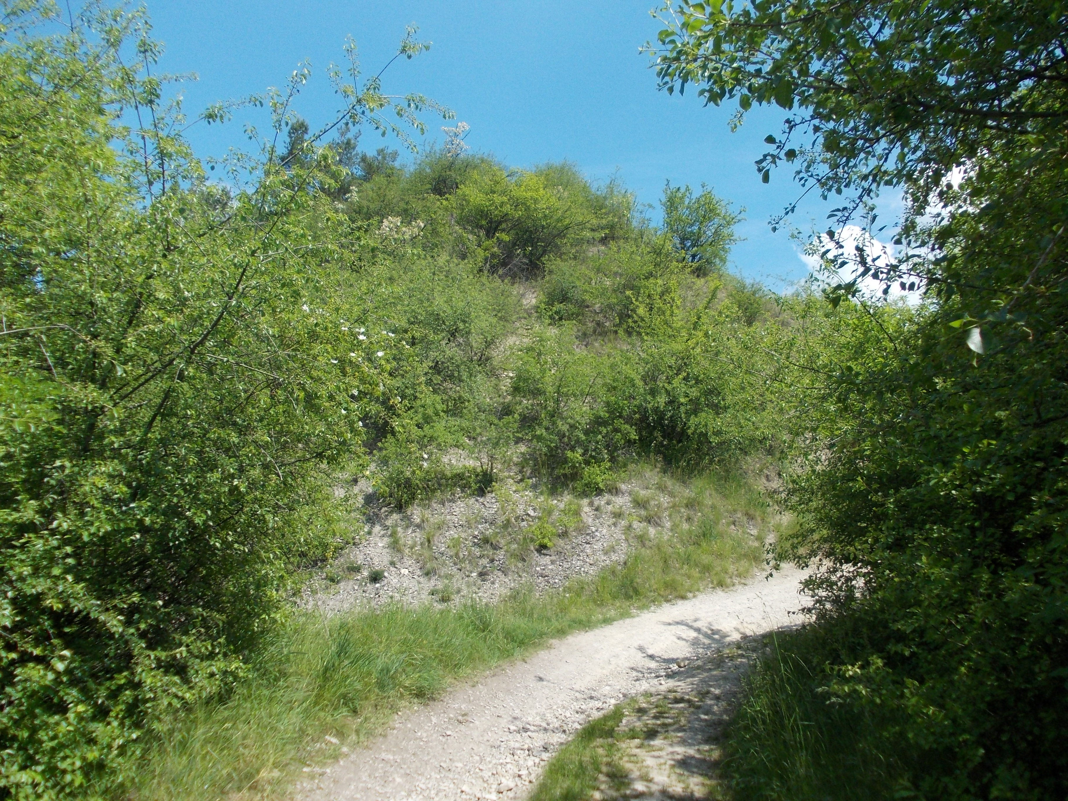 Alter Kalksteinbruch bei Köllme (Gemeinde Salzatal), NSG Muschelkalkhänge der Nietleben-Bennstedter-Mulde